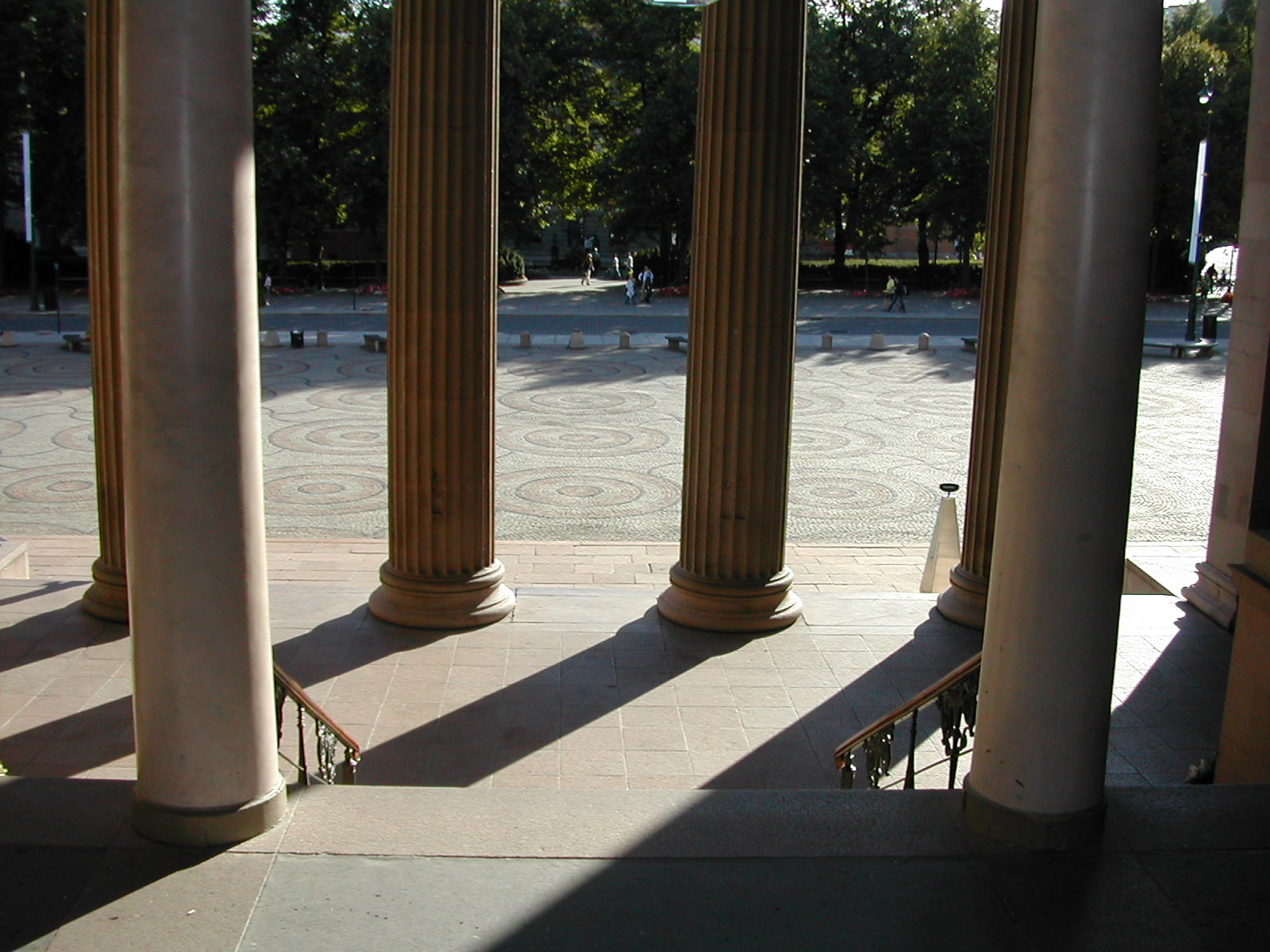 Domus Media, Universitetet i Oslo